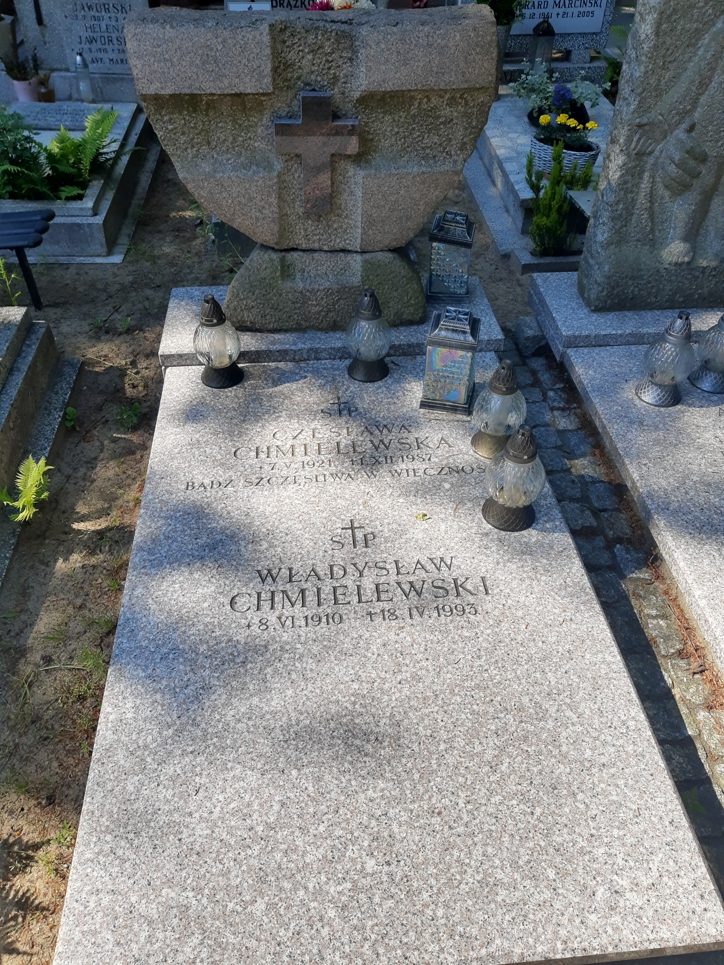 Grób Władysława Chmielewskiego na Cmentarzu Witomińskim